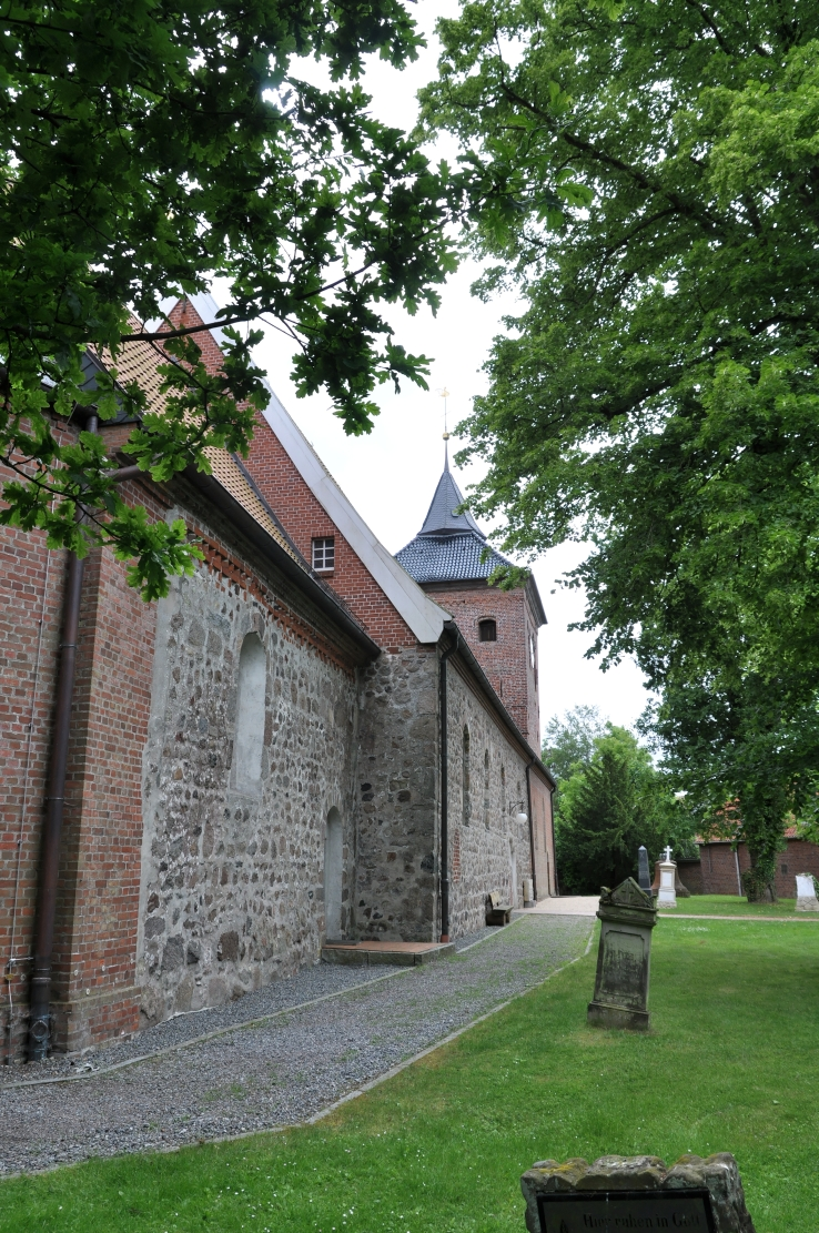 Bilder Nordleda 2012 05